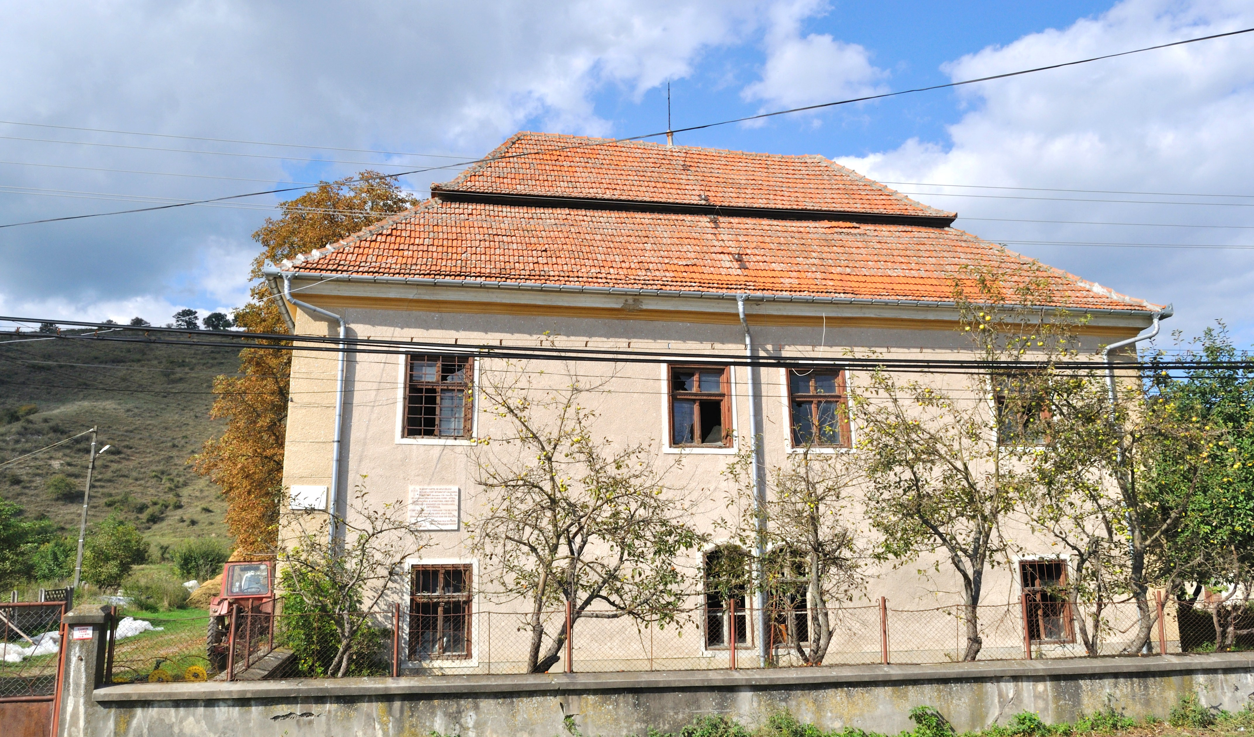 Bobâlna, județul Hunedoara